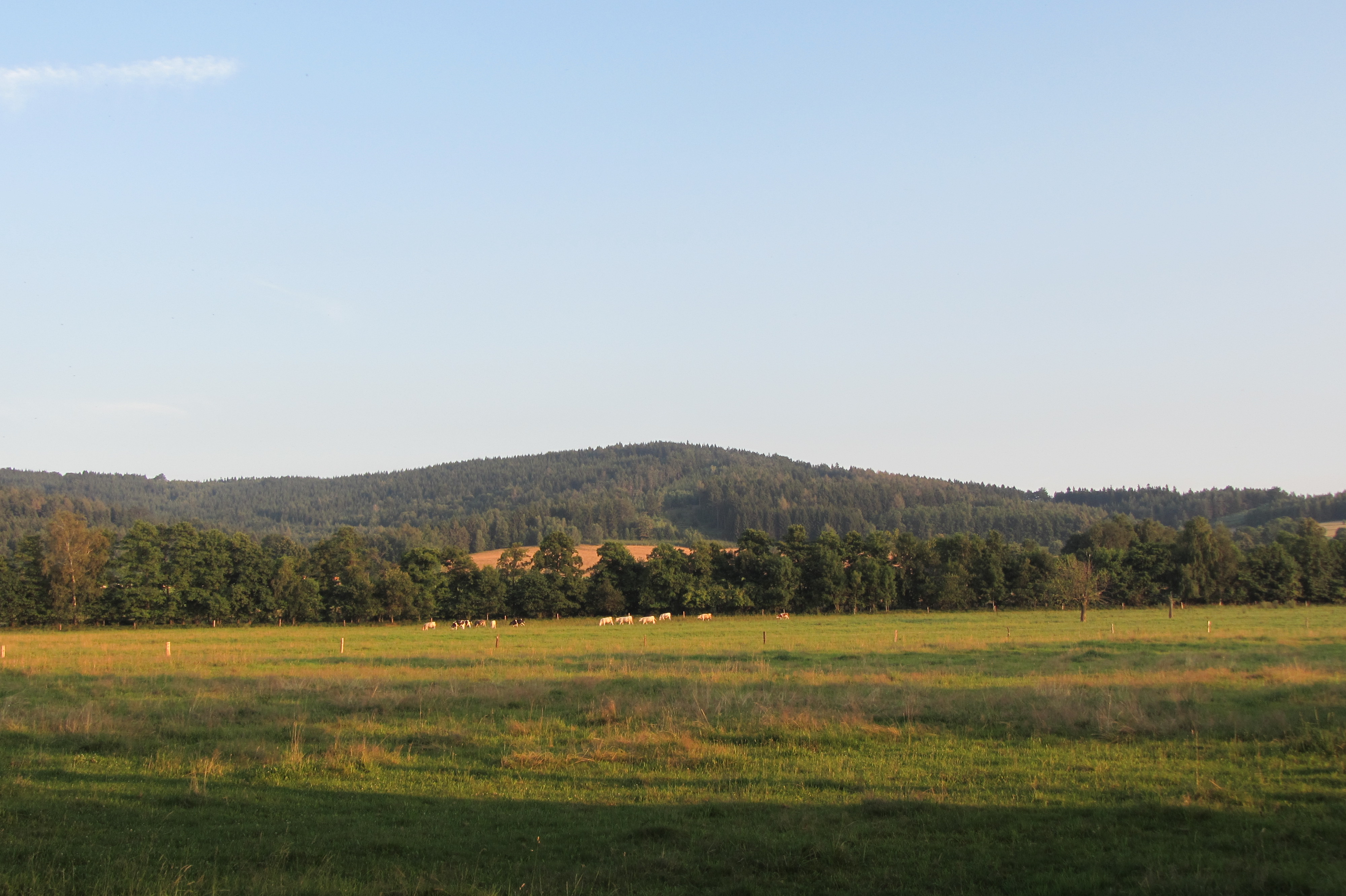 Vrch Závorník při pohledu ze silnice mezi Ludvíkovem pod Smrkem a Novým Městem pod Smrkem.